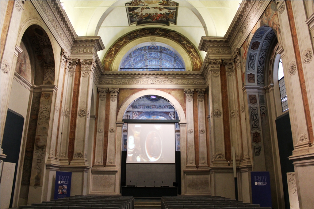 Presbiterio - Chiesa di S. Giulia - Brescia